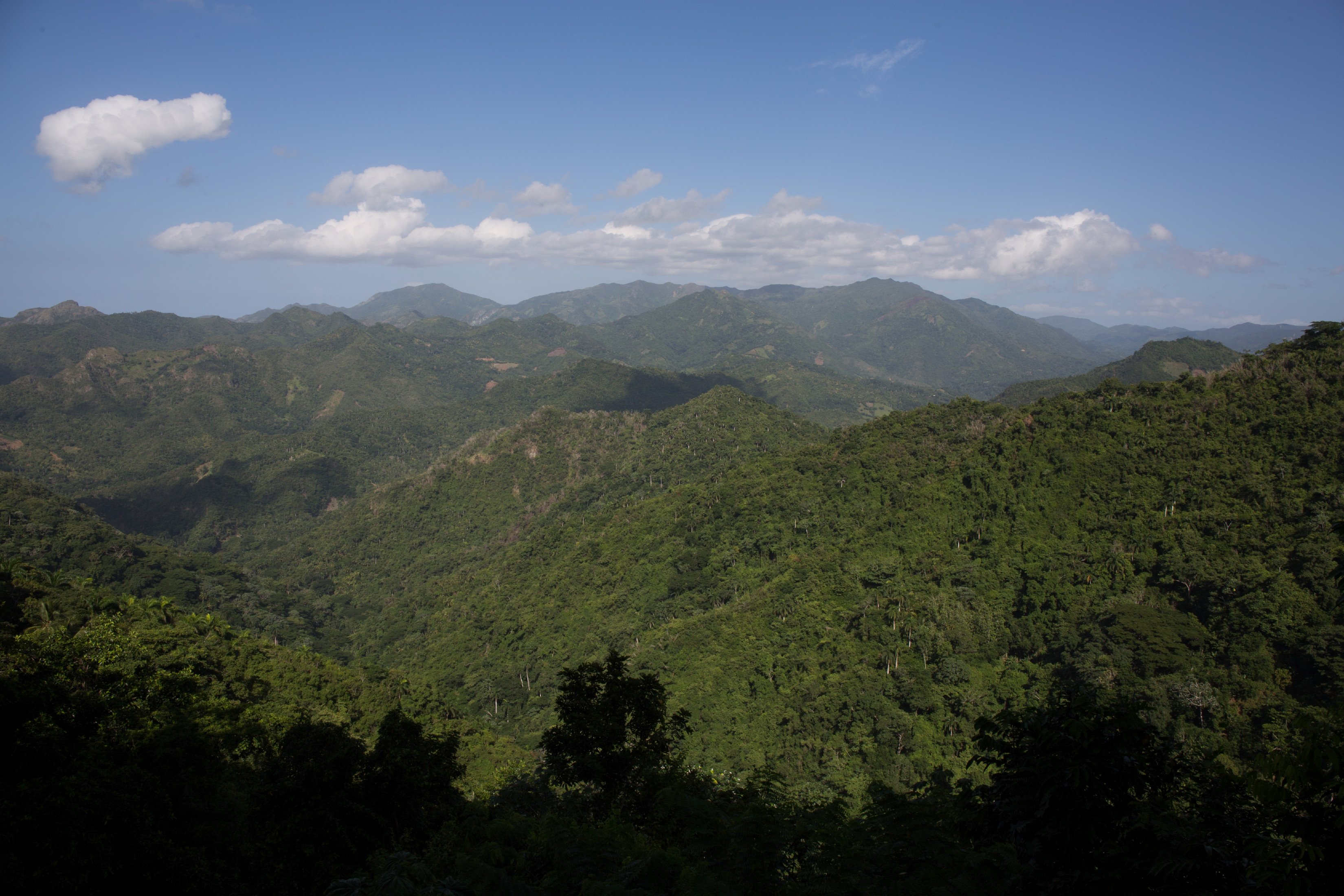 Blick zu den Cuchillas de Toa von den Cuchillas de Baracoa